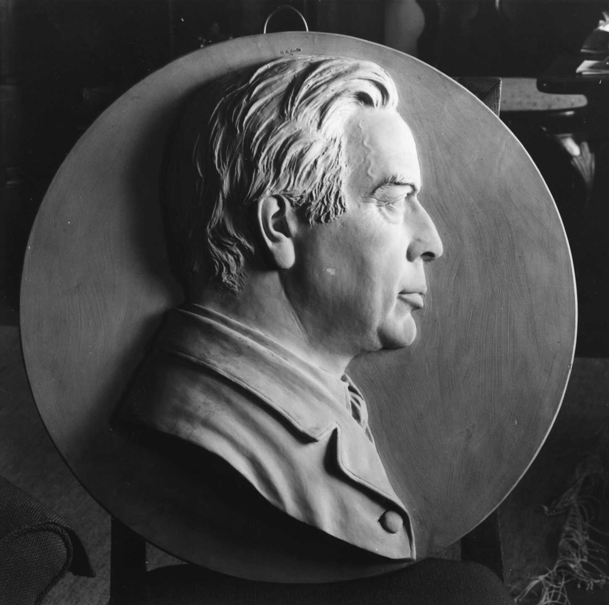 Georg Andreas Bull. Fra Byhistorisk samling hos Oslo Museum.